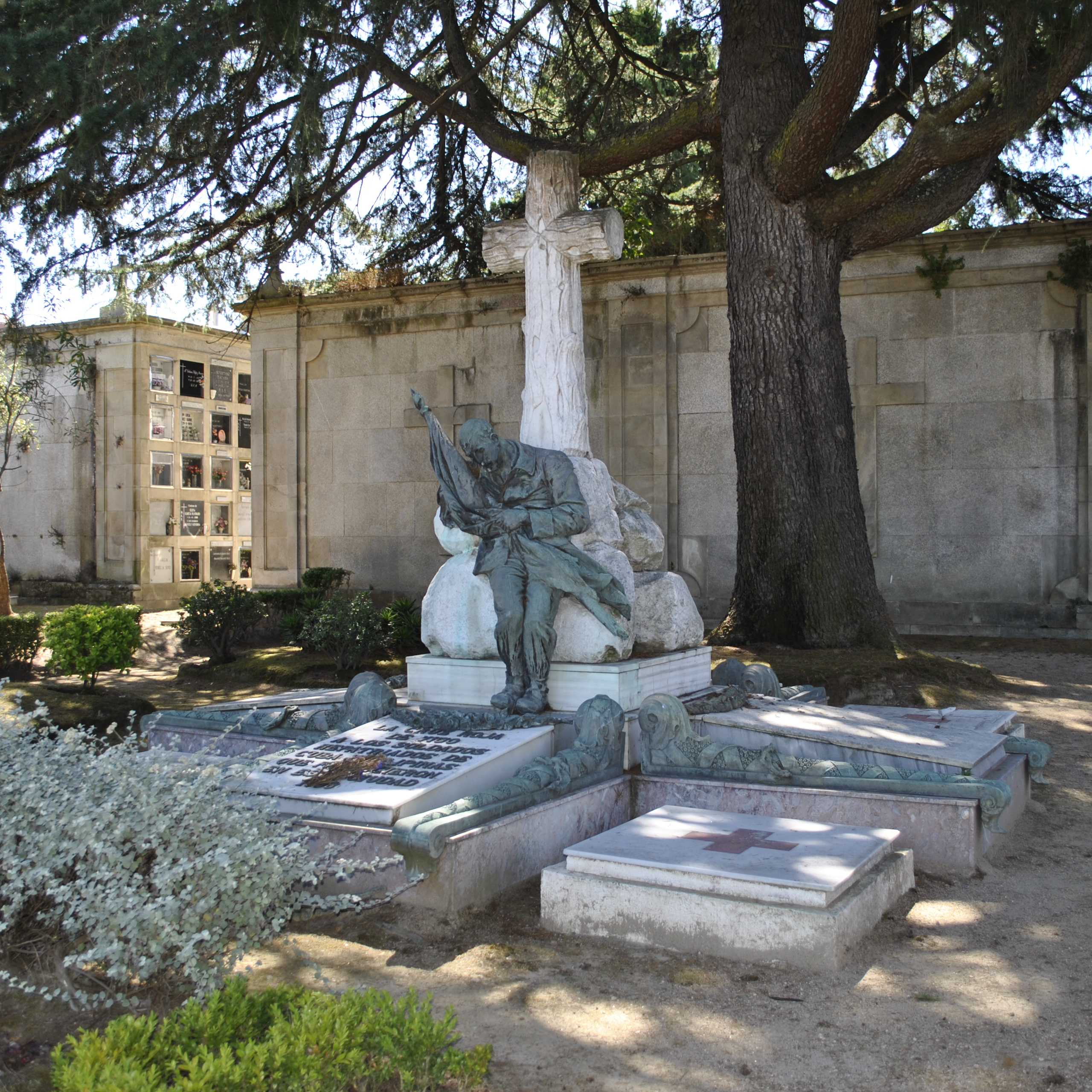 Del escultor Julio Gozález Pola (1865-1929) y el marmolista Juan Baliño Rivas: La Cruz Roja de Vigo a los soldados repatriados de Cuba y Filipinas.1898.jpg